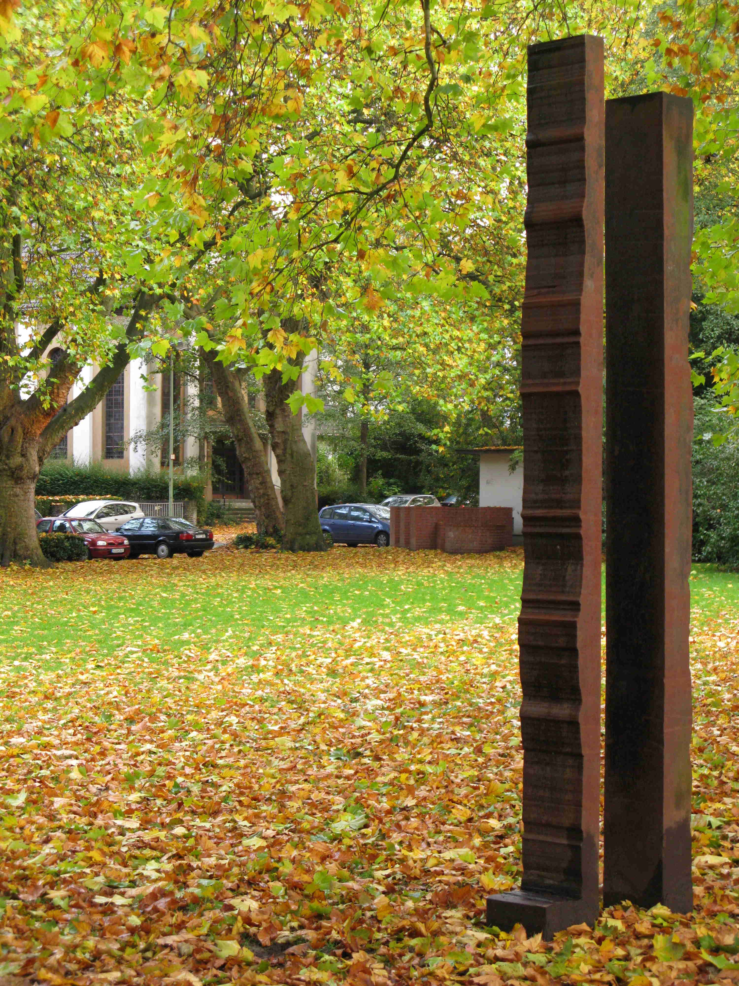 Moltkeplatz Essen: Skulpturen von Ansgar Nierhoff und (im Hintergrund) Hannes Forster